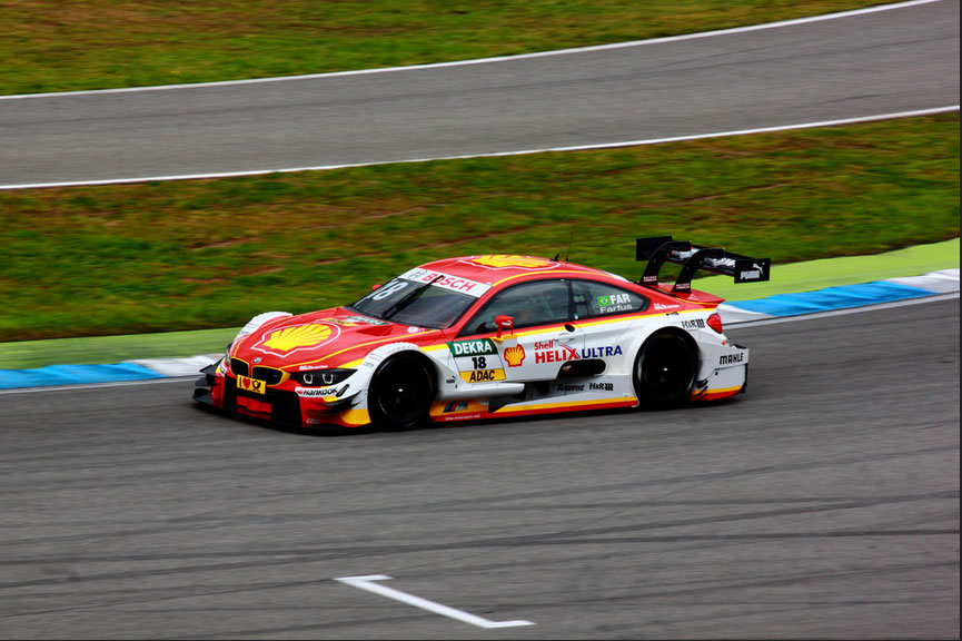 Photographie d'Augusto Farfus sur le Hockenheimring, dans le cadre du championnat DTM en 2015